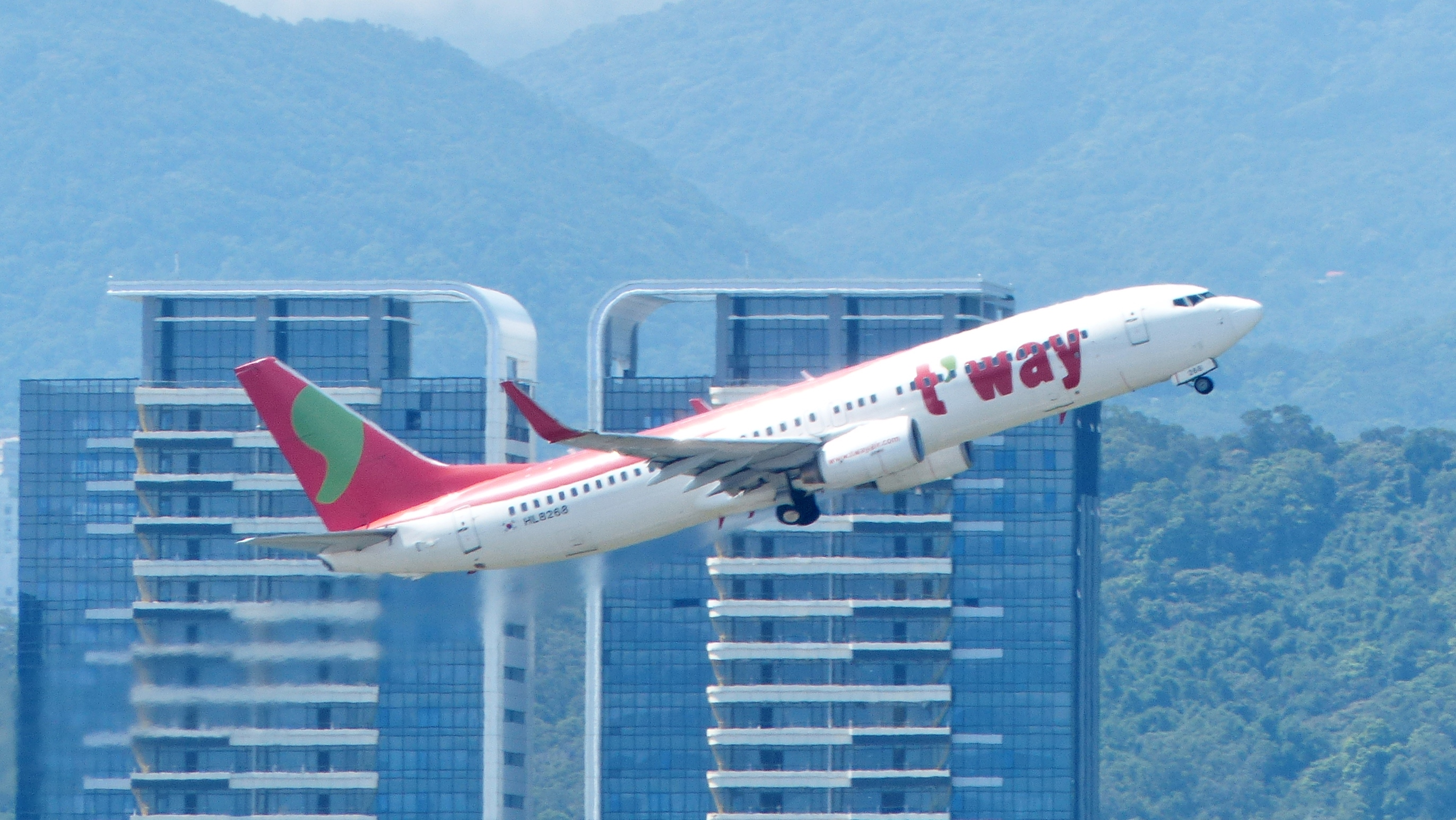 從臺北松山機場起飛的南韓德威航空波音737-83N HL8268。